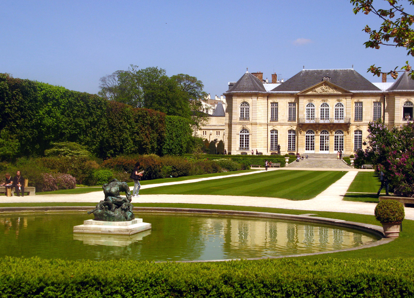 Дом и музей Огюста Родена в Париже